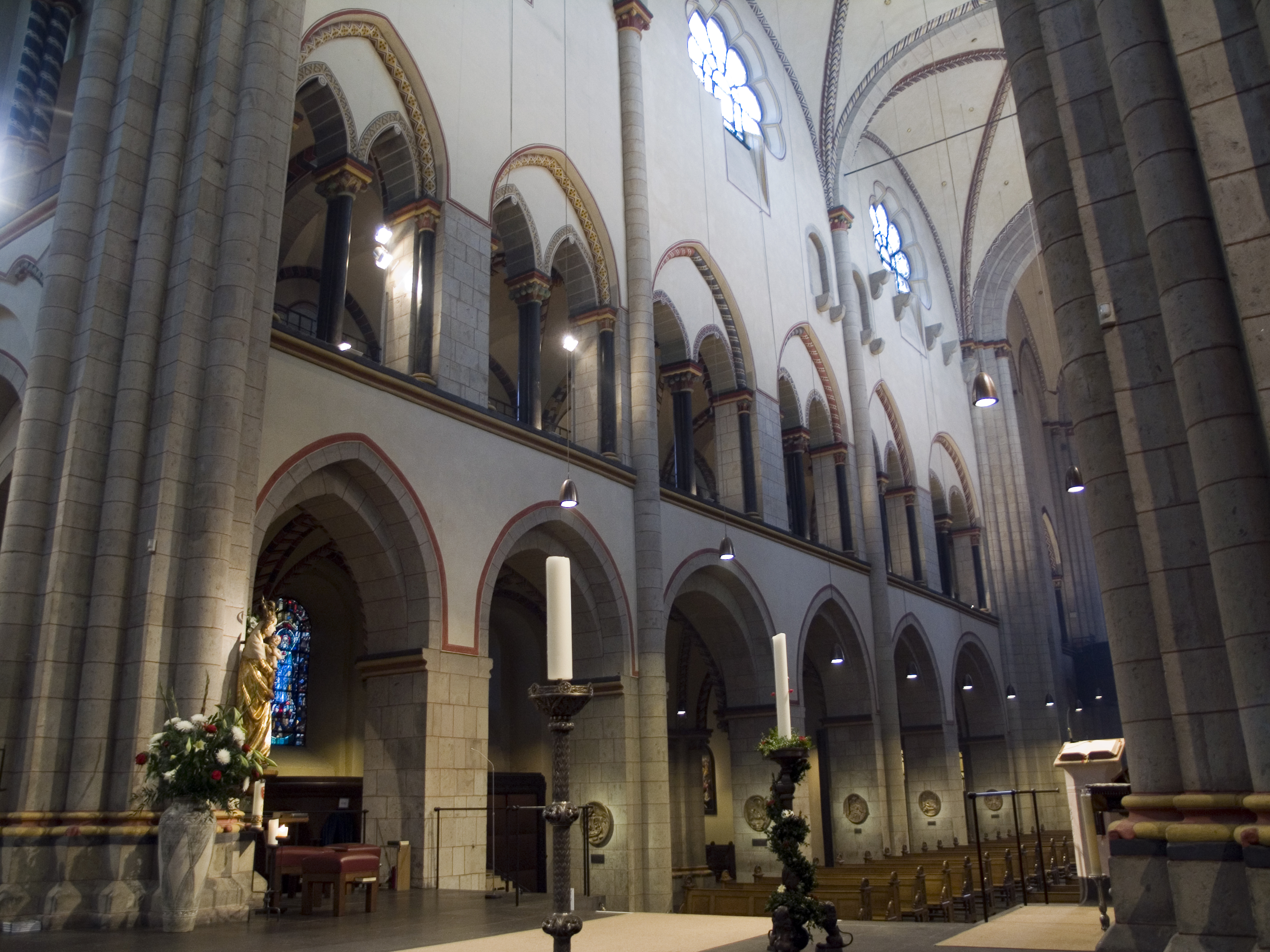 Северный Рейн-Вестфалия, Нойс - Базилика Святого Квиринуса